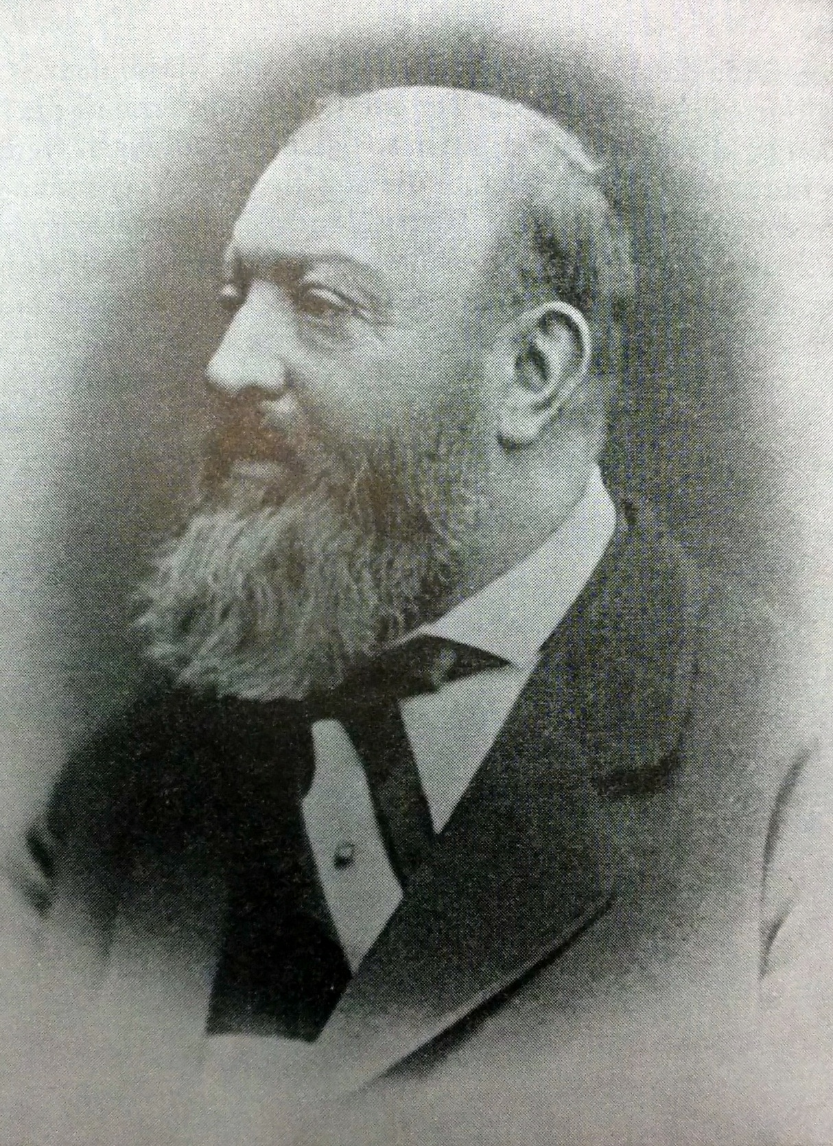 Johannes Haag This image (or other media file) is in the public domain because its copyright has expired. This applies to Australia, the European Union and those countries with a copyright term of life of the author plus 70 years. You must also include a United States public domain tag to indicate why this work is in the public domain in the United States. Note that a few countries have copyright terms longer than 70 years: Mexico has 100 years, Colombia has 80 years, and Guatemala and Samoa have 75 years, Russia has 74 years for some authors. This image may not be in the public domain in these countries, which moreover do not implement the rule of the shorter term. Côte d'Ivoire has a general copyright term of 99 years and Honduras has 75 years, but they do implement the rule of the shorter term. This file has been identified as being free of known restrictions under copyright law, including all related and neighboring rights.